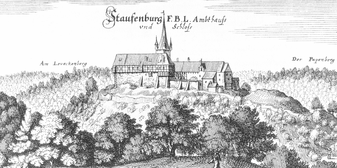 Kupferstich von Merian von der Stauffenburg 1654